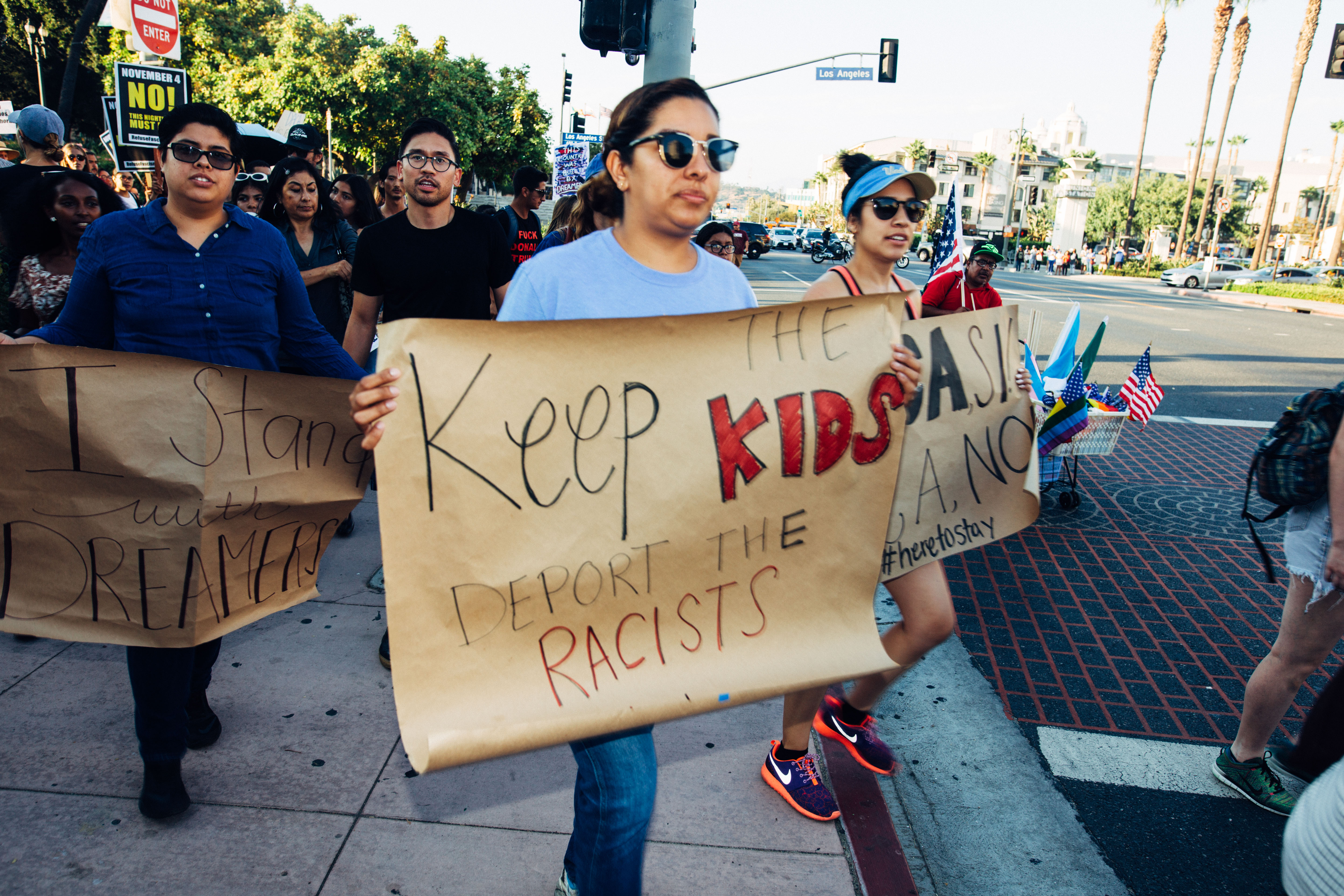 Los Angeles 9-5-17